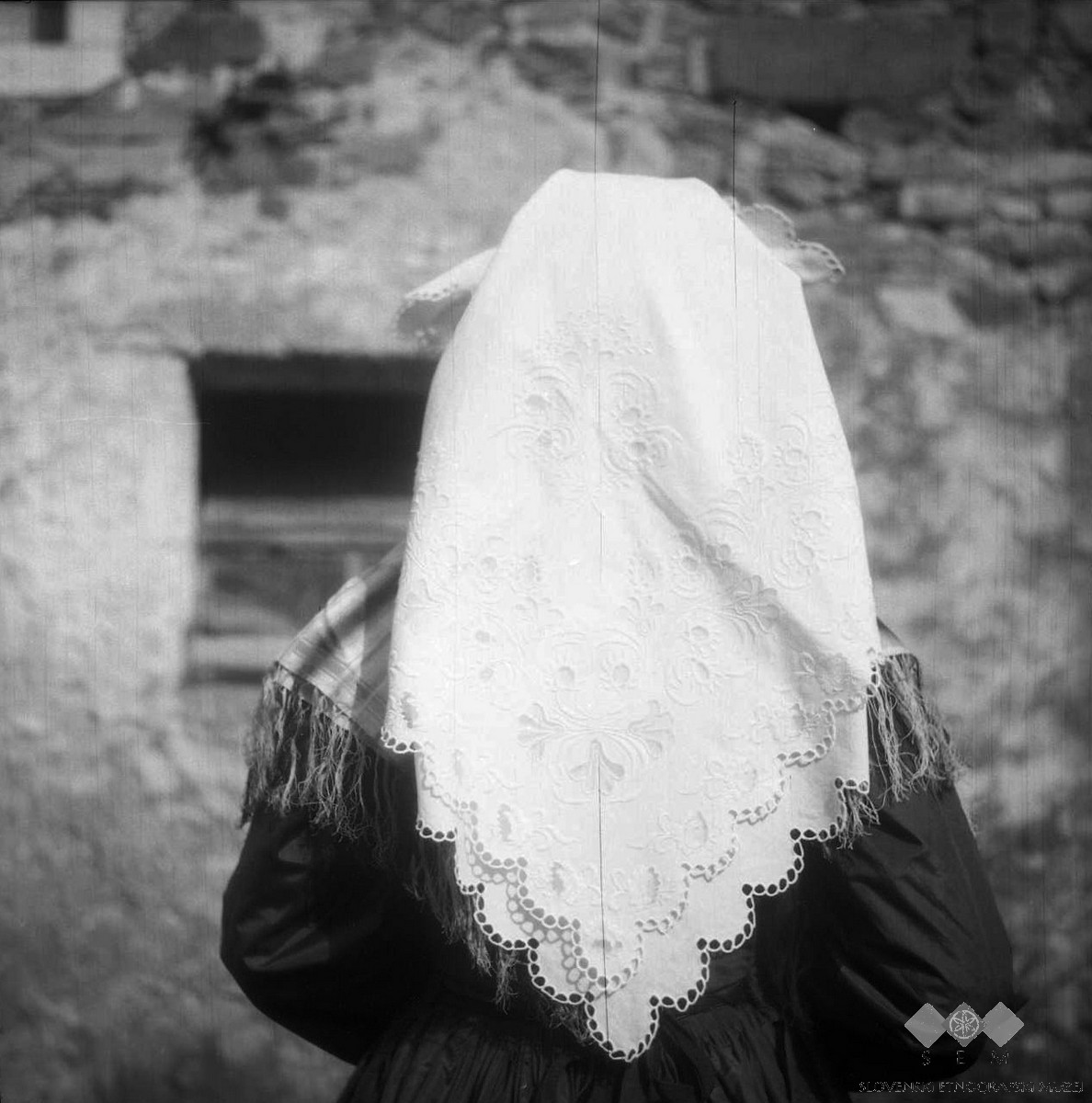 Pokrivanje peče, abtuha, Podraga.